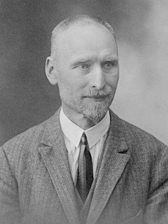 Jaan Sarv